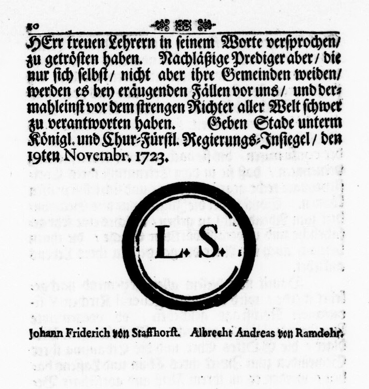 Albrecht Andreas von Ramdohr (1649-1730) und Johann Friedrich von Staffhorst, Stade den 19. Nov.1723, Verordnung zur Einführung des Gesenius-Katechismus im Hzgt. Bremen-Verden